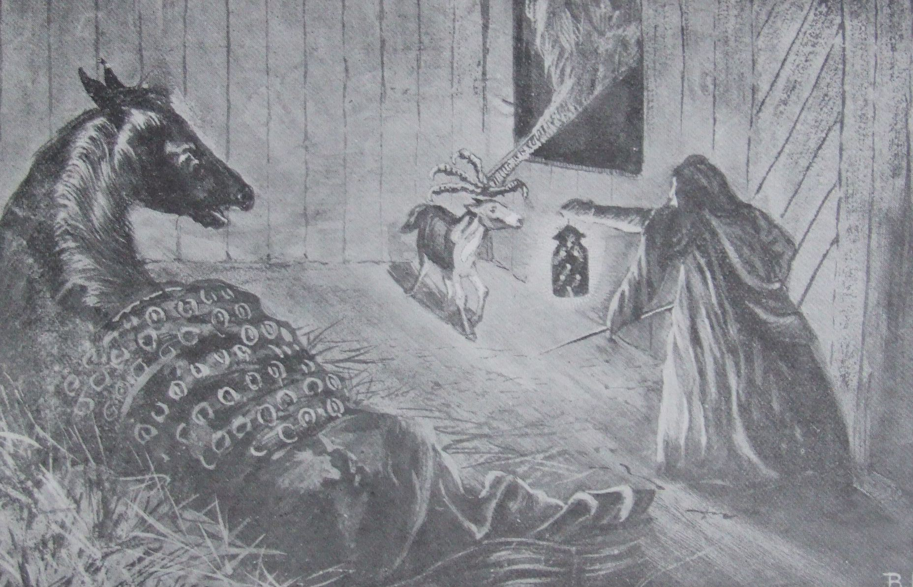 Teyrnon (Pedair Cainc) (darlun o'r gyfrol Chwedlau Cymru Fu, Merthyr Tudful 1906: llun gan Anatiomaros)